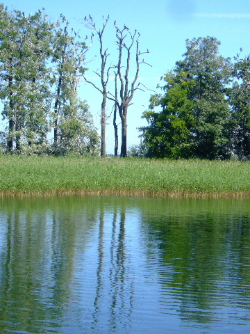 Wyspa Kormoranów na jeziorze Mamry